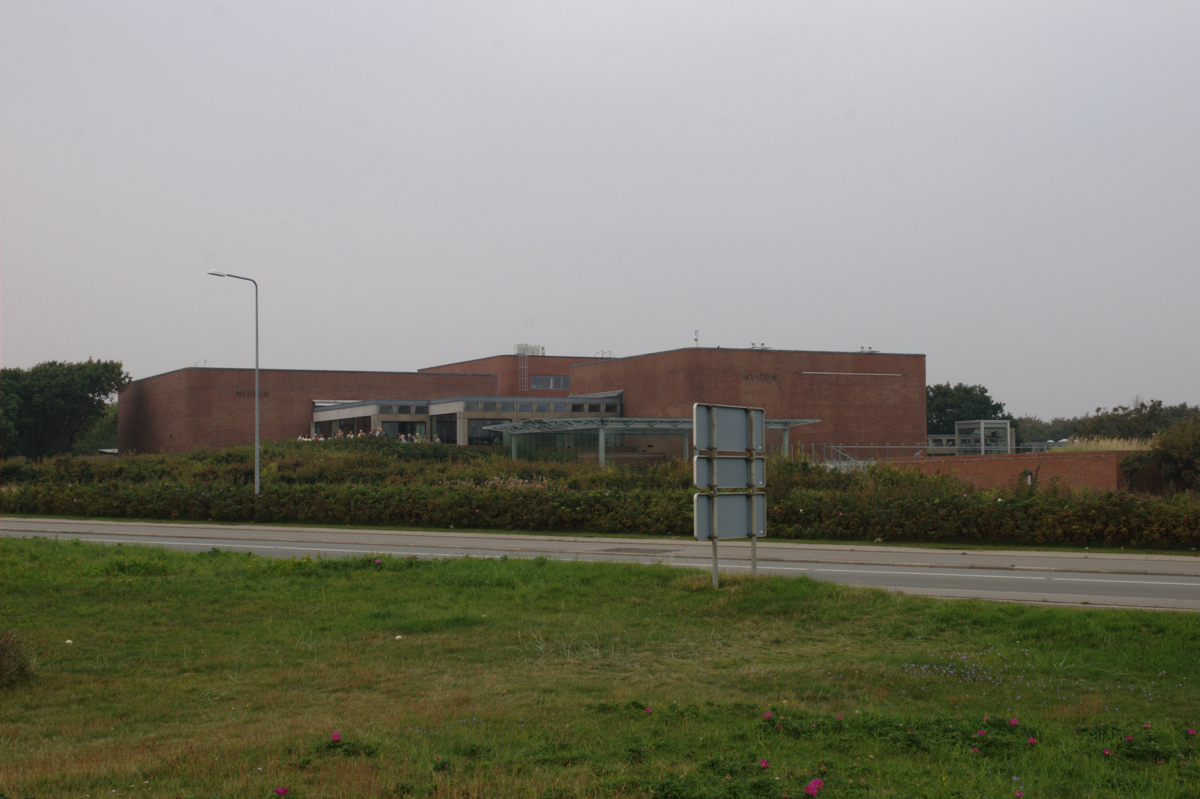 Esbjerg Fiskeri- og Søfartsmuseum set fra Sædding strandvej